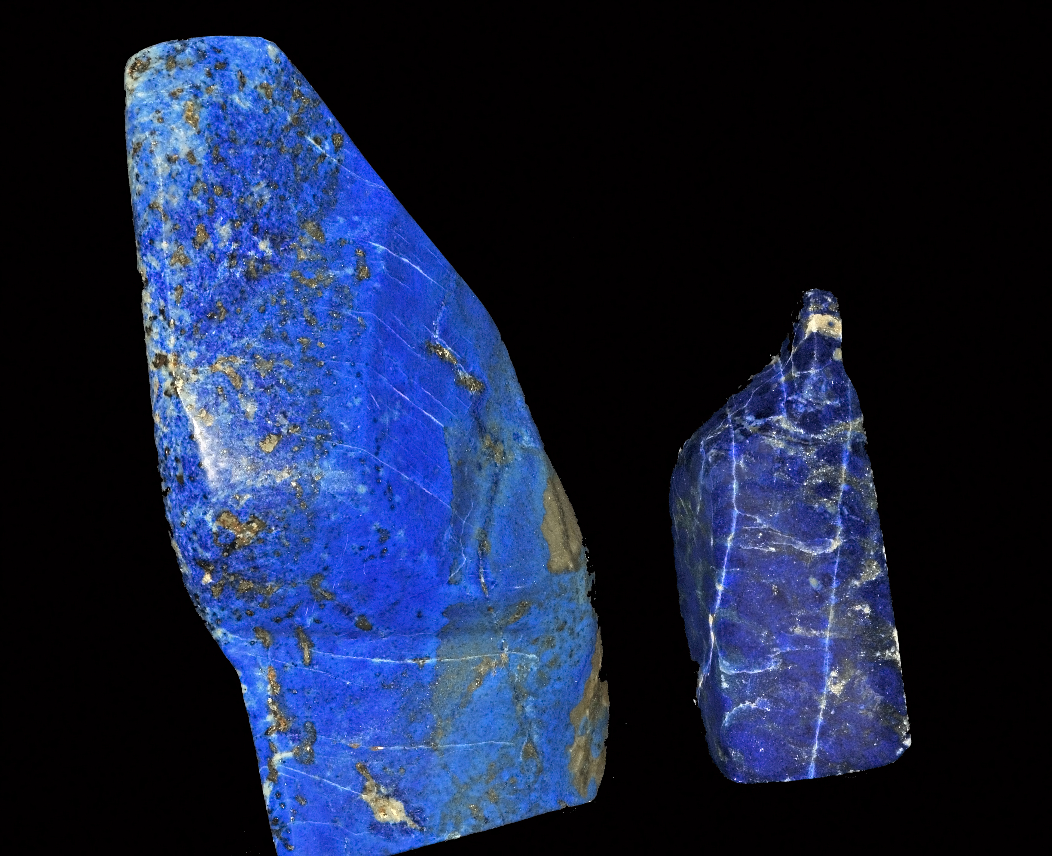 lazurite polie : Sar-e-Sang (Sar Sang ; Sary Sang), Koksha Valley (Kokscha Valley ; Kokcha Valley), Khash & Kuran Wa Munjan Districts, Badakhshan Province (Badakshan Province ; Badahsan Province), Afghanistan